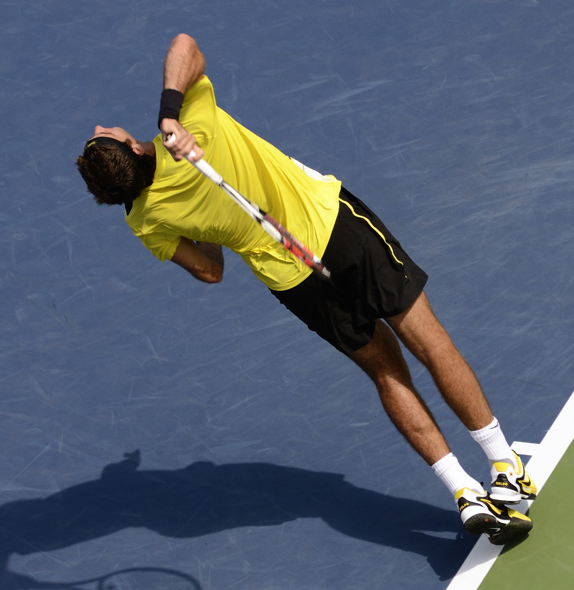 delpo launch